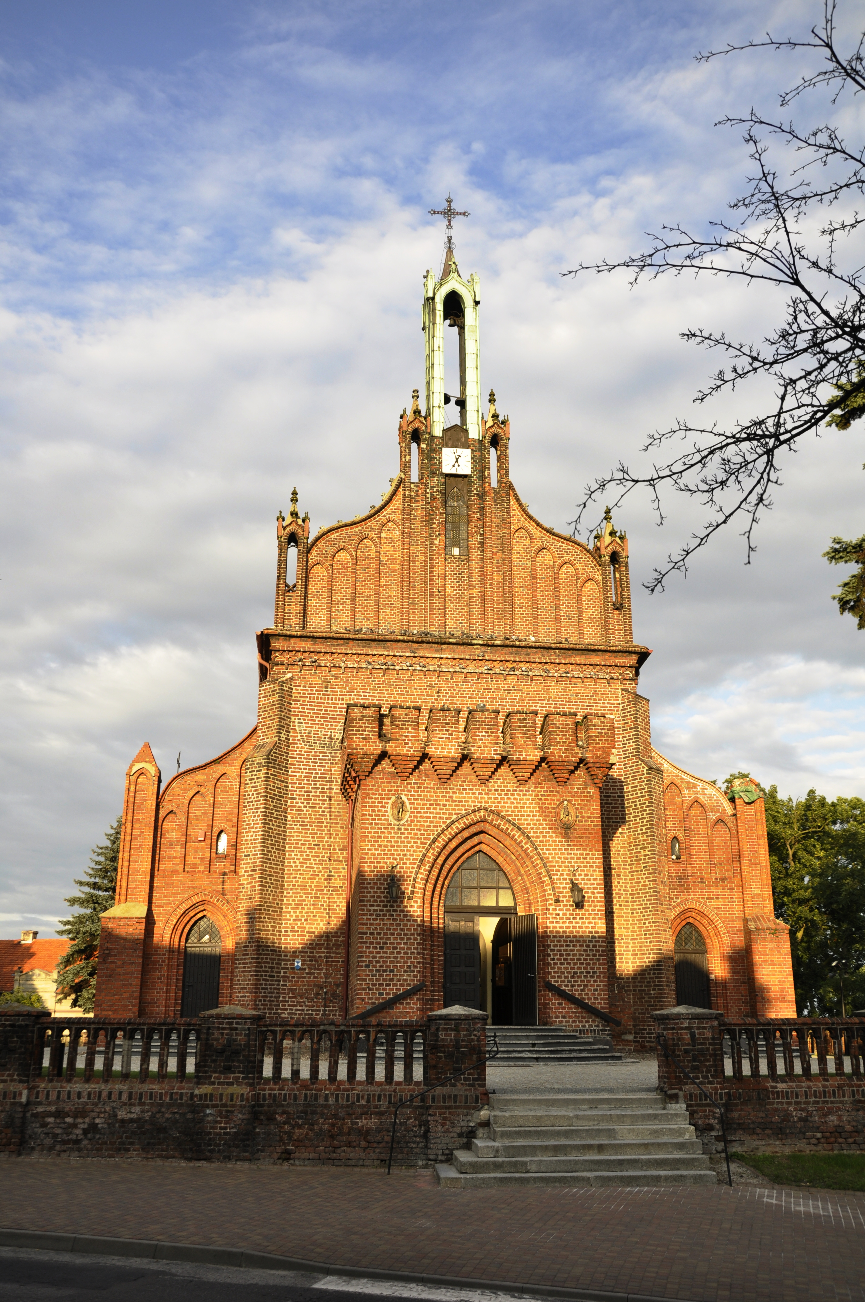 Miloslaw